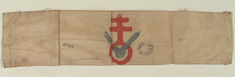 Brassard de la Seconde Guerre mondiale fait d'une seule pièce de tissu blanc avec un ourlet piqué. En partie centrale, la croix de Lorraine, la cocarde et le V. Pas de système d'accrochage.